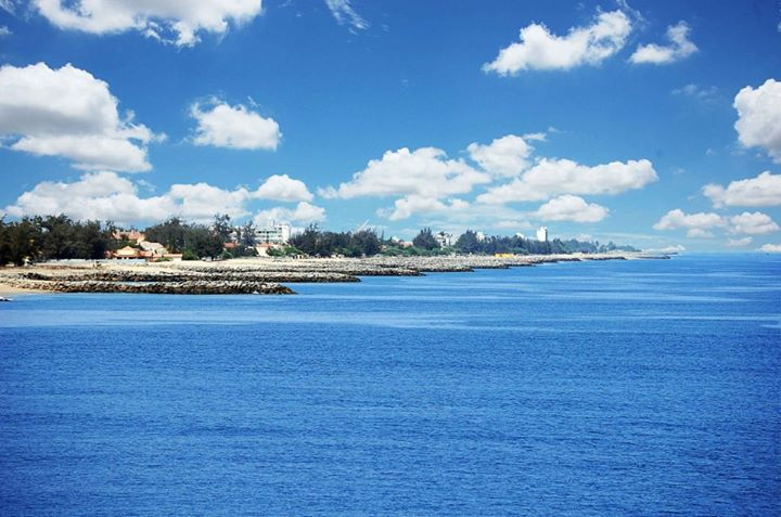 Lobito City